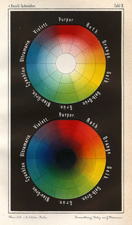 Wilhelm von Bezold's Farbentafel.